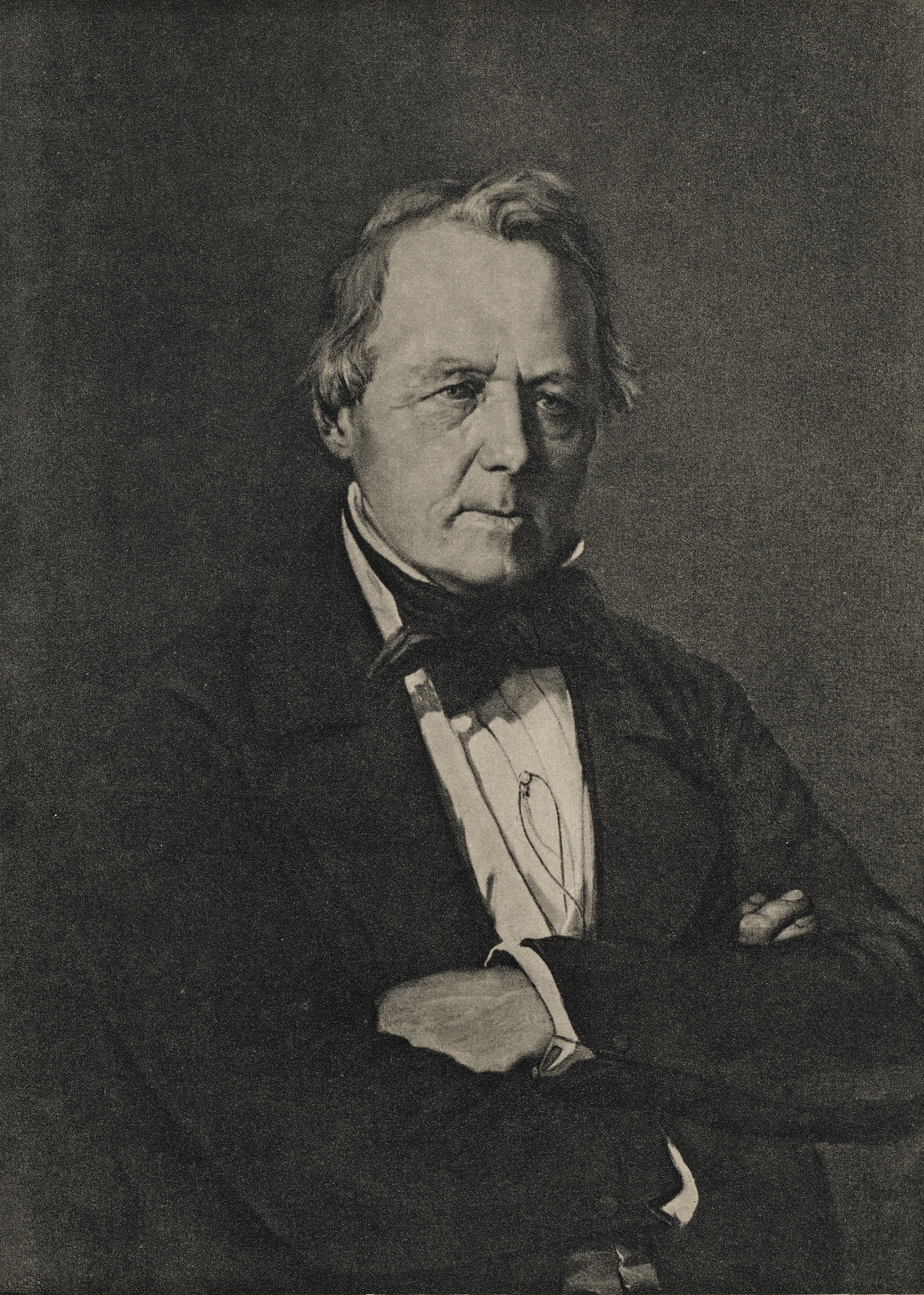 Format: Litografi (etter maleri av K. Bergslien) Utgivelsesår / Published: 1913 (Vore Høvdinger 48) Utgiver / Publisher: F. Bruns Bokhandels Forlag, Trondhjem Wikipedia: Michael Krohn (1793 - 1878) Salmonsens konversationsleksikon: Michael Krohn (1793 - 1878) Eier / Owner Institution: Trondheim byarkiv, The Municipal Archives of Trondheim Arkivreferanse / Archive reference: Ila skole, Va - F9419 Fra Salmonsens konversationsleksikon: Krohn [kro.n], Michael, norsk Forretningsmand, f. i Bergen 14. Maj 1793, d. smst. 31. Aug. 1878, var, ligesom tidligere Faderen, Købmand i sin Fødeby 1829—50 og hørte til de ledende Mænd i Byens Forretningsverden. Banebrydende Associationsforetagender i denne skyldes han Initiativ og Planlæggelse; 1845 oprettede han »Bergenske Søforsikringsselskab«, 1852 blev »Det Bergenske Dampskibsselskab«, som senere udvidedes til det største Dampskibsrederi i Norge, stiftet efter hans Forslag og Indbydelse, og 1855 grundlagde han »Bergens mek. Værksted« med Tørdokanlæg i Solheimsviken. Ogsaa Broforbindelsen fra Nygaard til Solheimsviken skyldes ham, ligesom Oprettelsen af »Bergens Privatbank«, der udviklede sig paa Grundlag af en privat Diskonterrngsindretning, han i nogle Aar havde drevet sammen med en Del andre Forretningsmænd. I Byens Styrelse tog han ogsaa Del i mange Aar fra 1839 af ligesom i andre halvoffentlige Hverv, altid med sine Medborgeres Anerkendelse for dygtigt Reformarbejde. Det politiske Liv holdt han sig uden for. (J. B. H.). K. F.